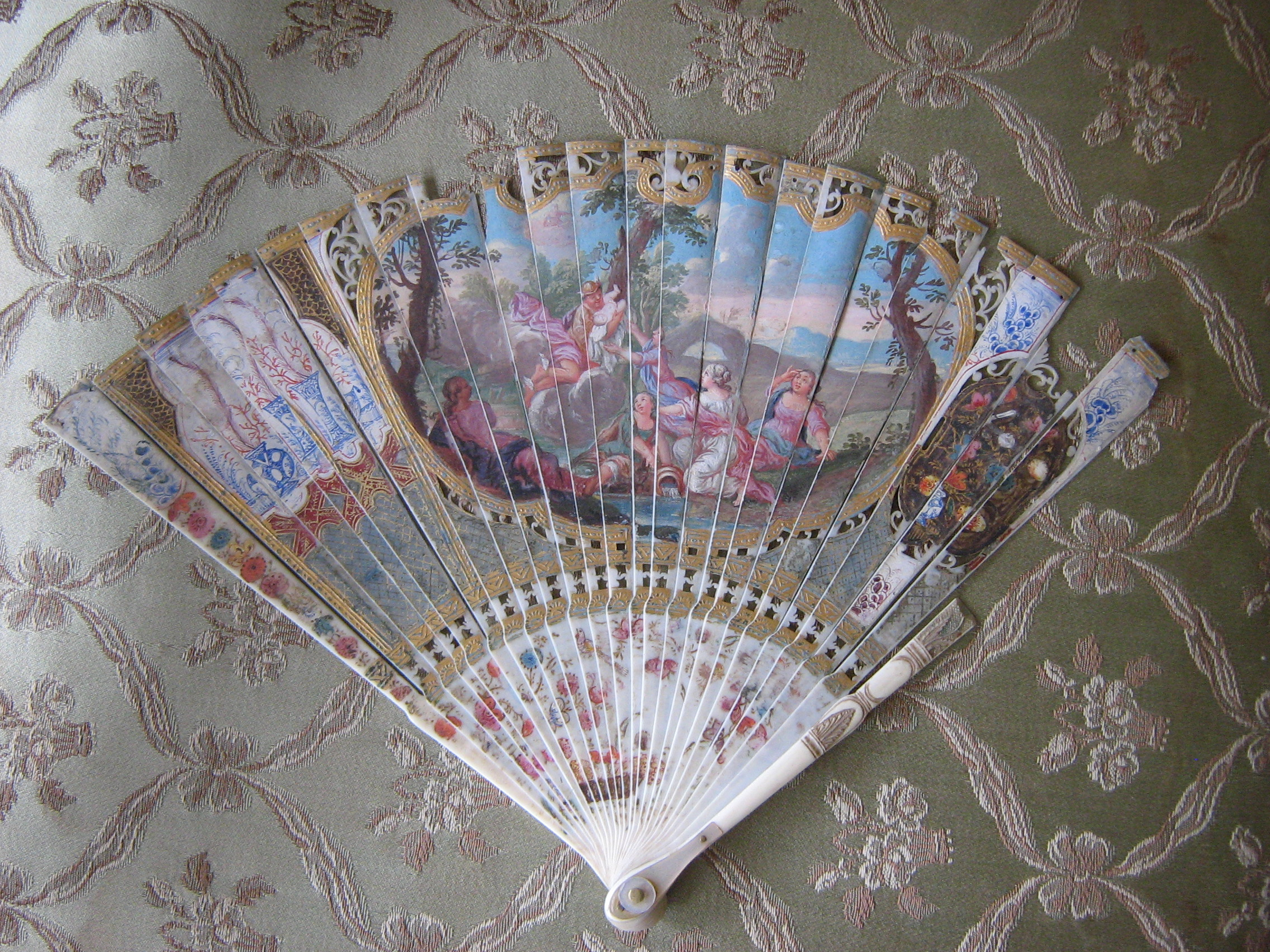 Rokokosolfjäder - Brisésoljfäder, oljemålning på elfenben